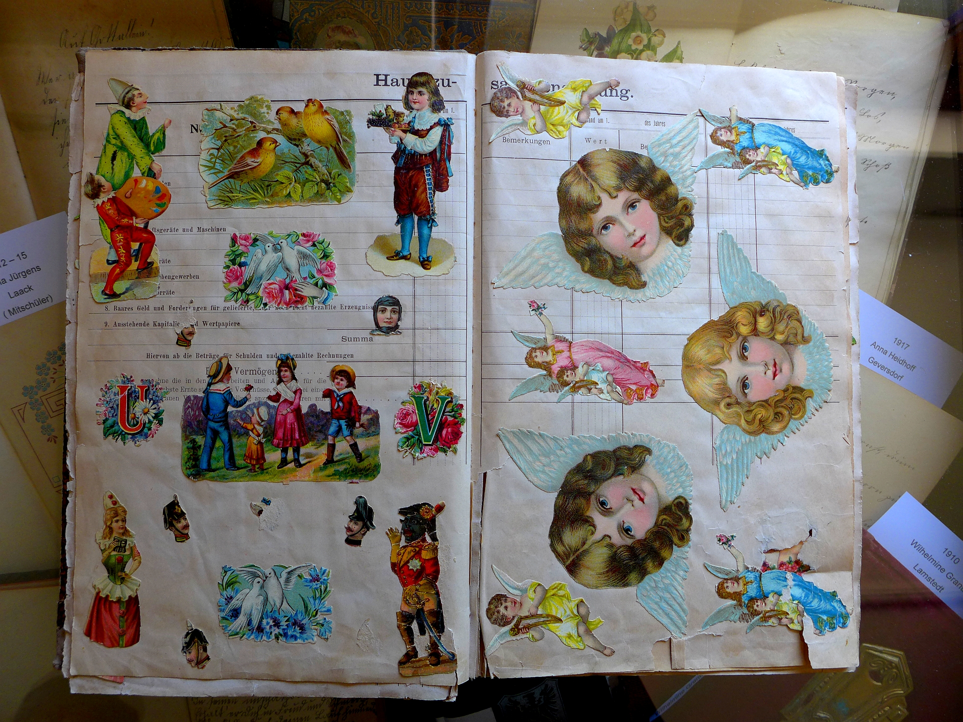 Oblatenbilder/Glanzbilder/glossy prints eingeklebt von einem jungen Mädchen in ein provisorisches Sammelalbum etwa im Jahre 1914. Exponat des Heimatmuseum Geversdorf, Niedersachsen, DE. Aufnahmedatum 2015-07.